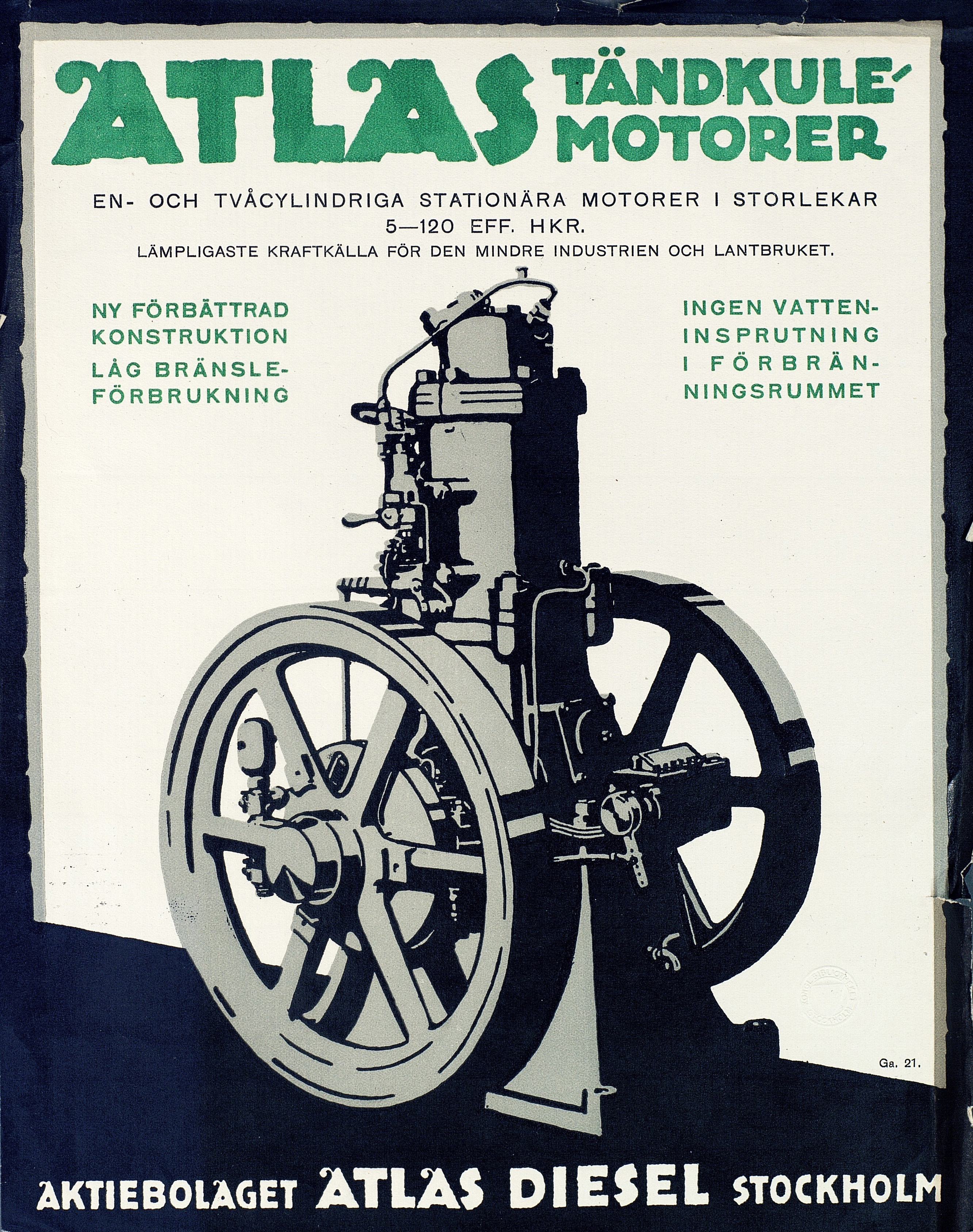 Atlas tändkulemotorer = Hot-bulb engines. Poster